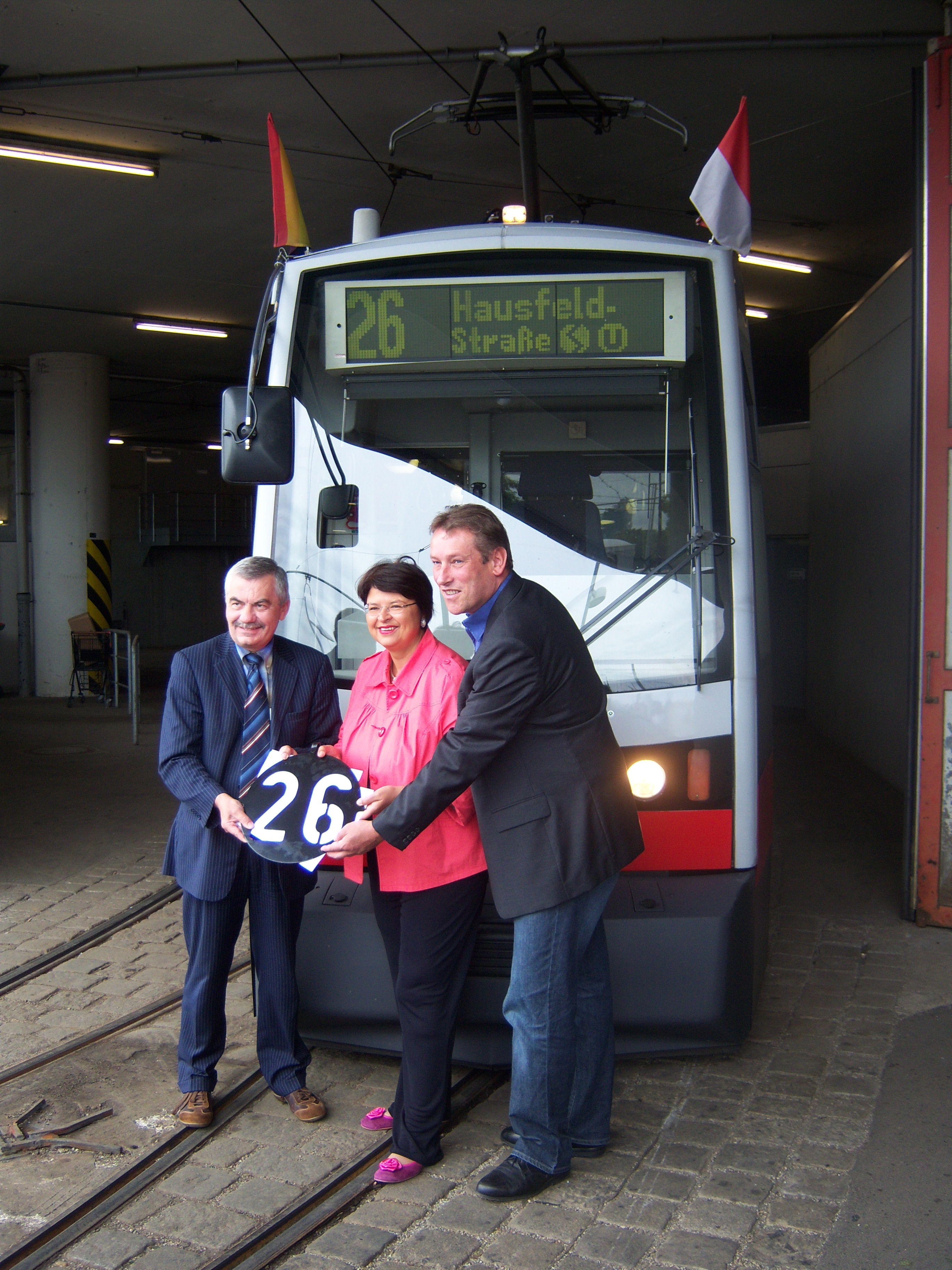 Fototermin zur geplanten Verlängerung der Straßenbahnlinie 26 zur Hausfeldstraße. Günter Steinbauer (Geschäftsführer Wiener Linien), Renate Brauner (Vizebürgermeisterin Wien), Norbert Scheed (Bezirksvorsteher Donaustadt) vor der Straßenbahnremise Kagran.